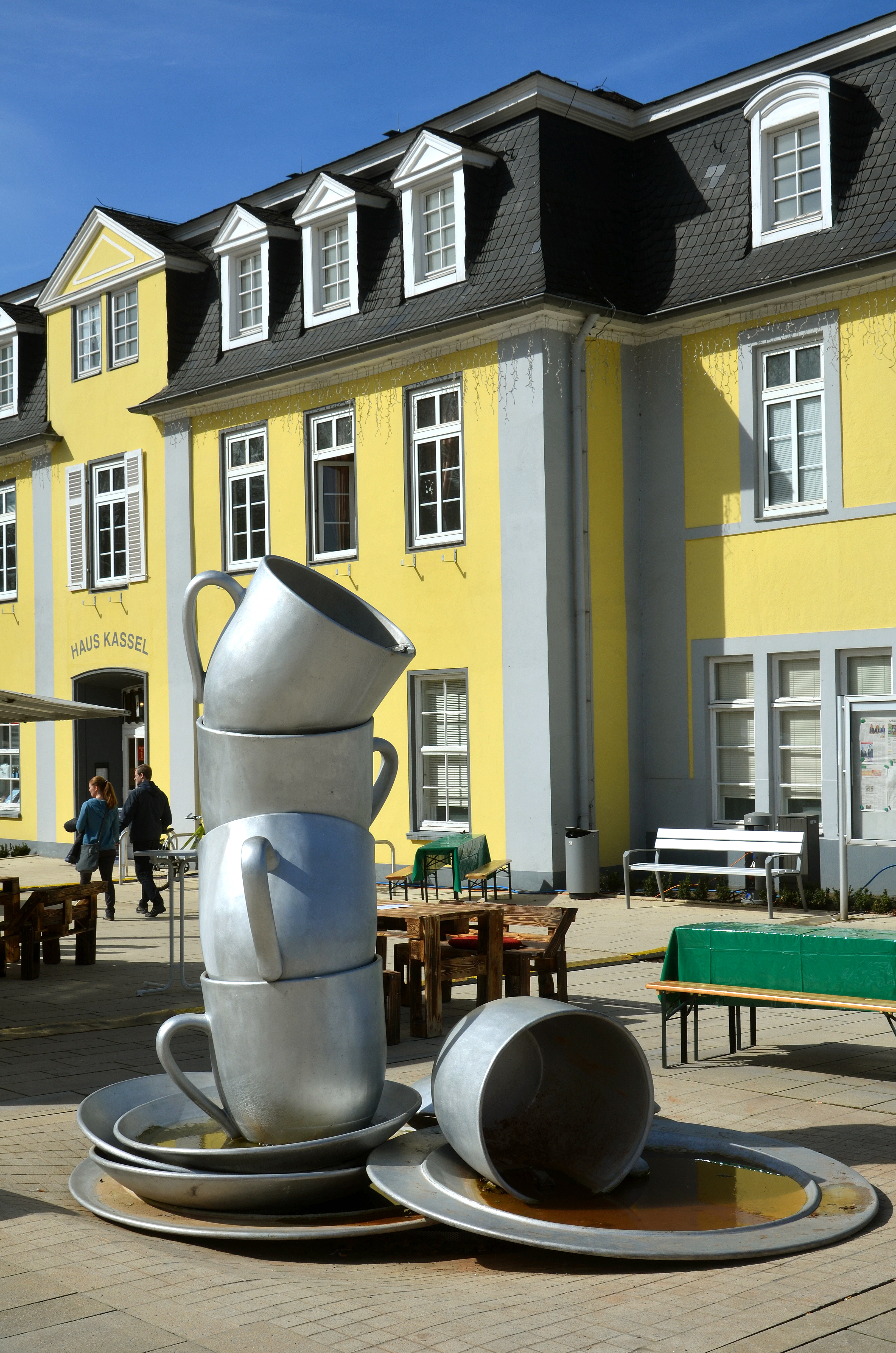 Die im Jahr 2016 in Betrieb genommene Brunnen-Skulptur Großer Abwasch des Künstlers Timm Ulrichs vor dem Haus Kassel am Kurpark von Bad Nenndorf ersetzte eine ältere Brunnenanlage am Platze ...